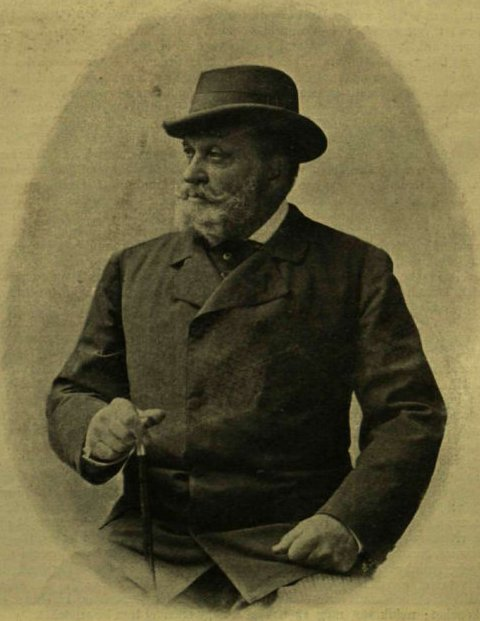 Andrássy Aladár magyar nagybirtokos, honvéd őrnagy.